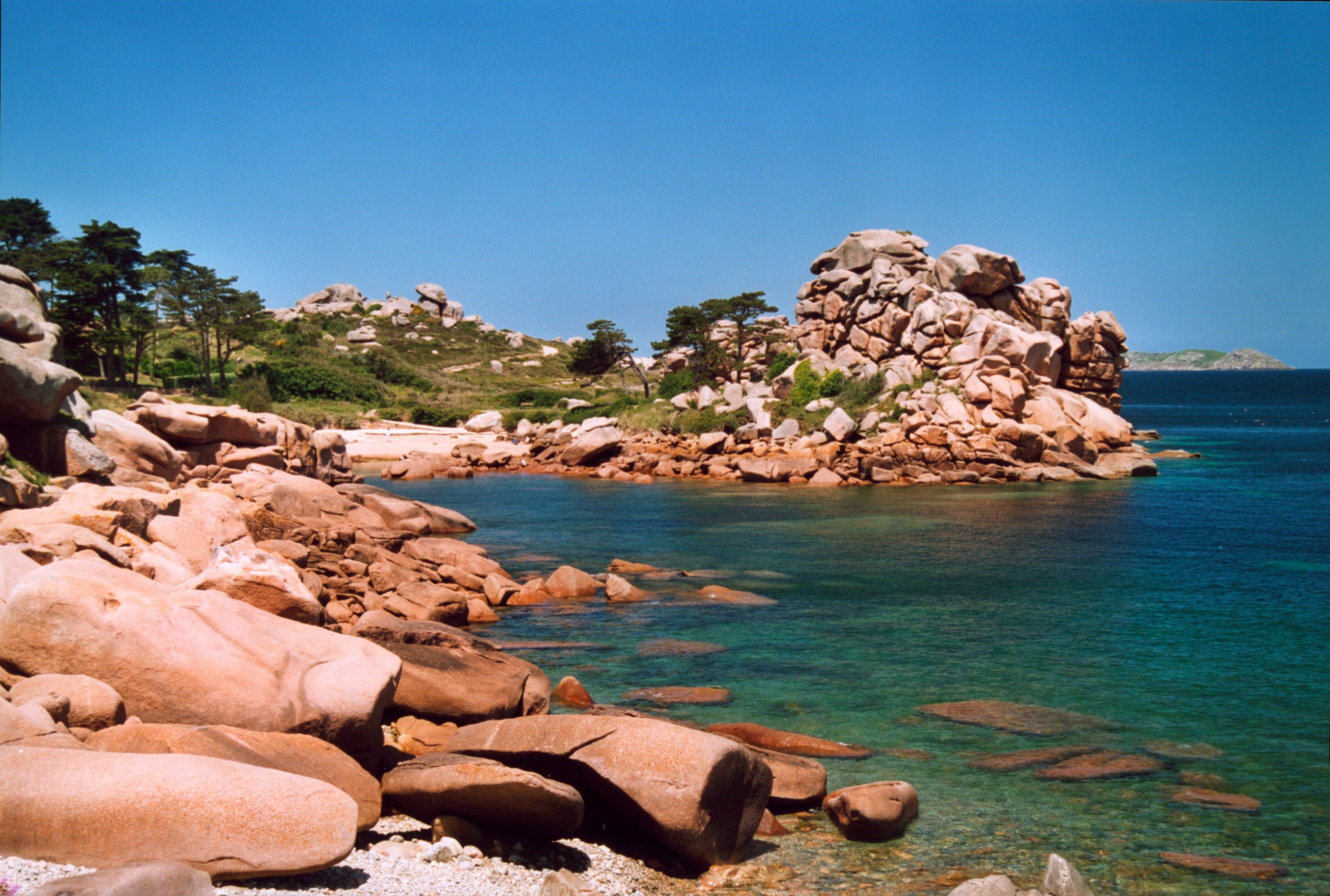 France Bretagne Côtes d'Armor Côte de granit rose